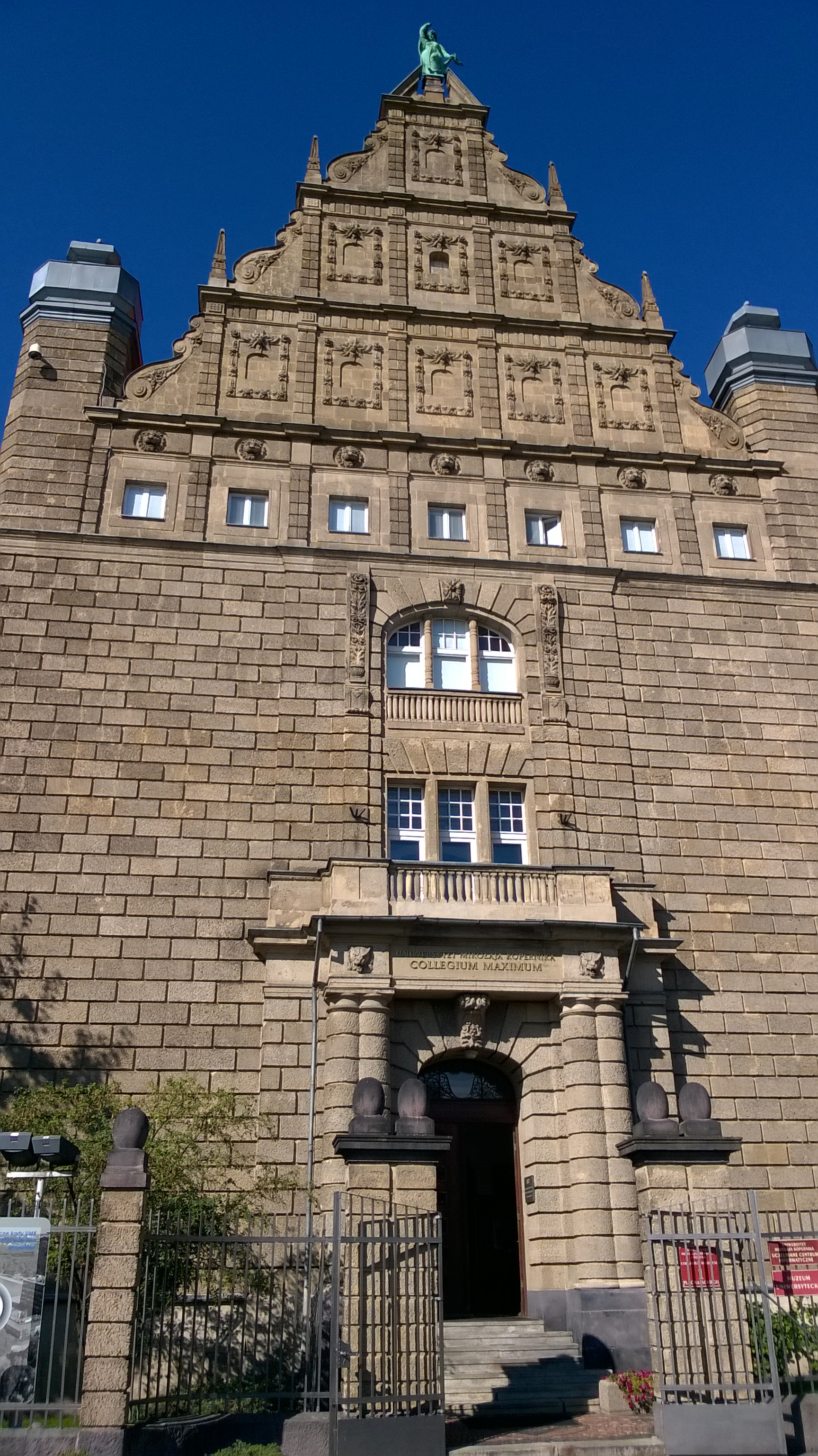 Muzeum Uniwersyteckie w Toruniu55